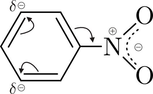 nitrobenzene